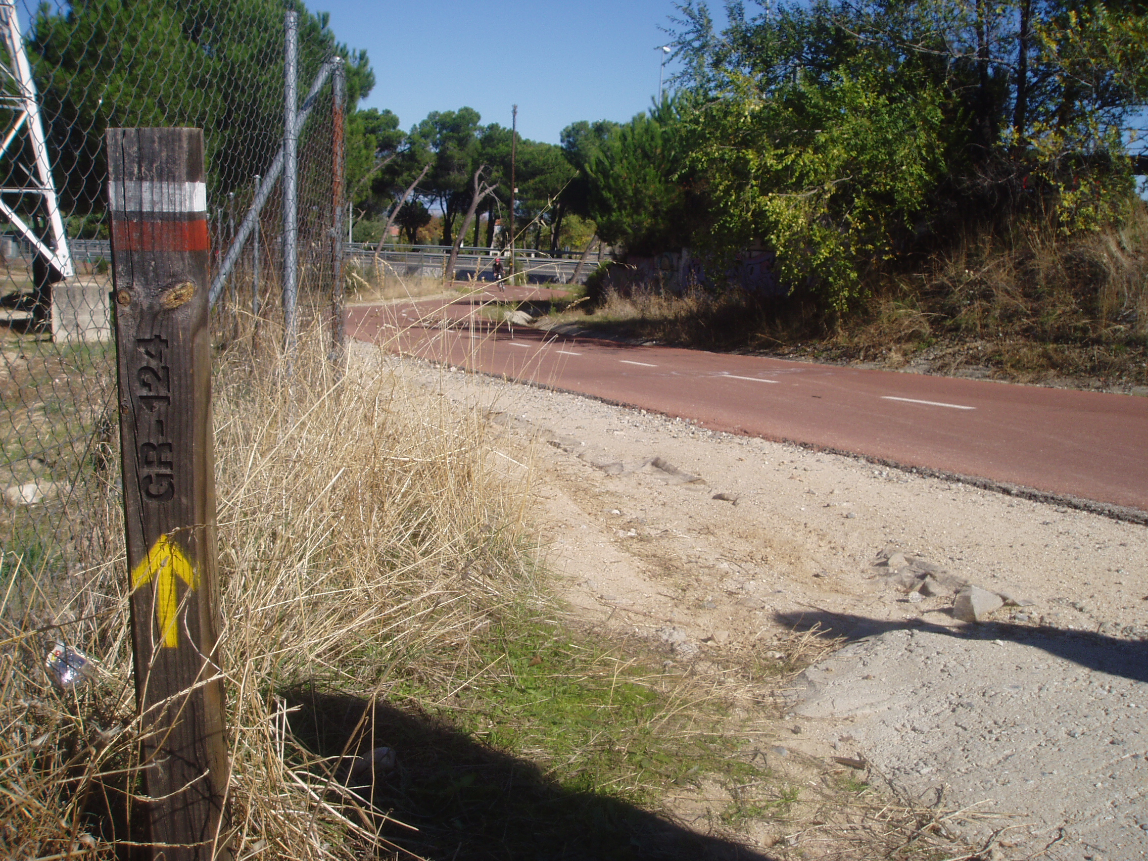 GR-124. Senda Real. Tres Cantos. Madrid. España.